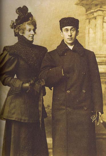 Zinaida Gippius and Akim Volynsky (Flexer)